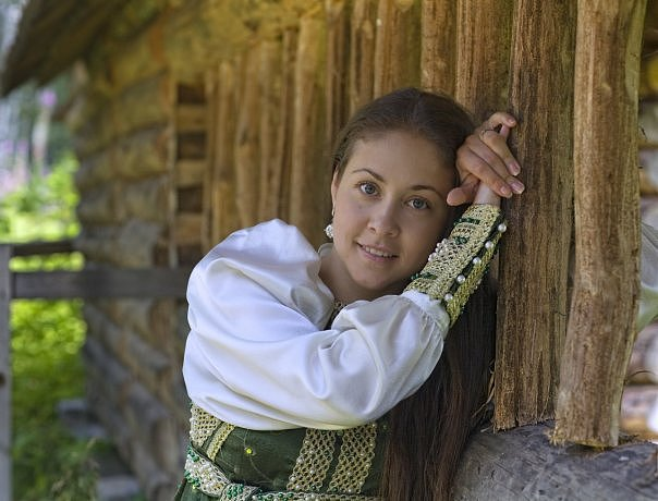 Алёна Петровская. Фото В. Ларионова.